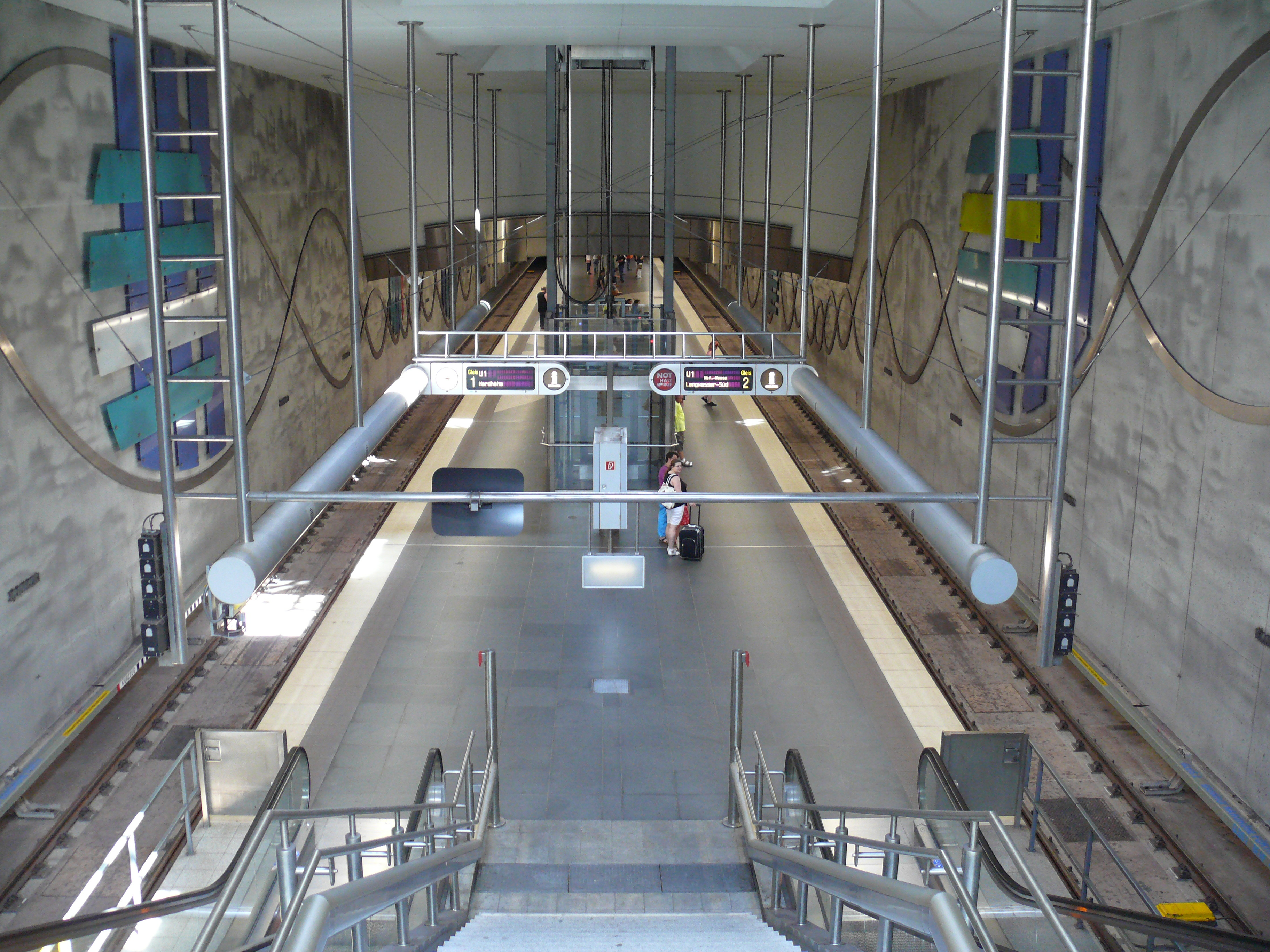 Blick auf die Bahnsteigebene am U-Bahnhof Klinikum in Fürth.